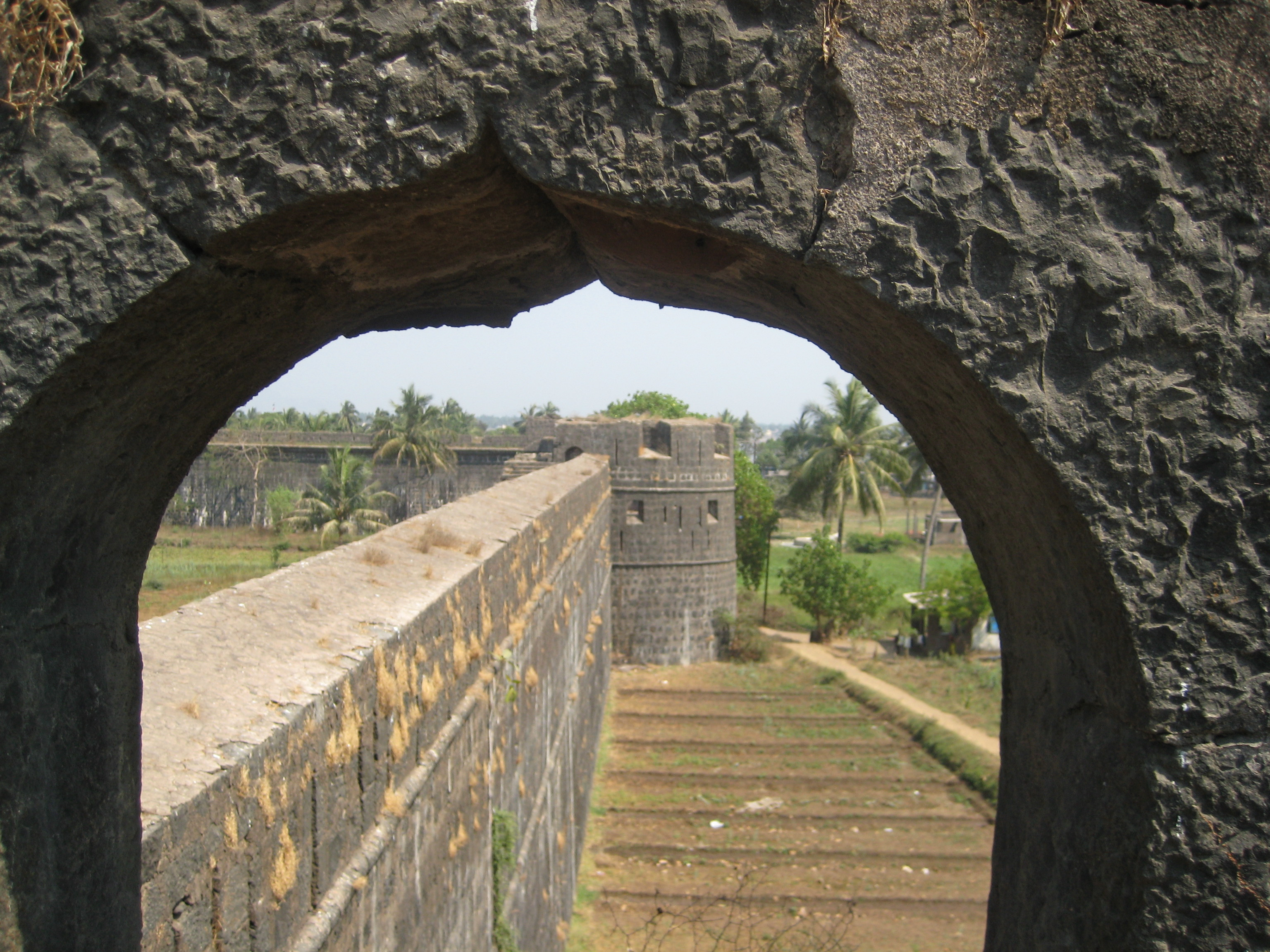 Arnala fort